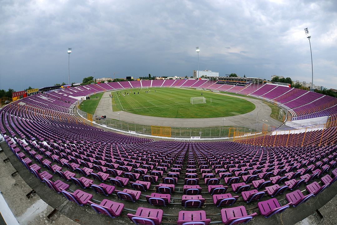 Stadionu Dan Paltinisan 2009-08-04